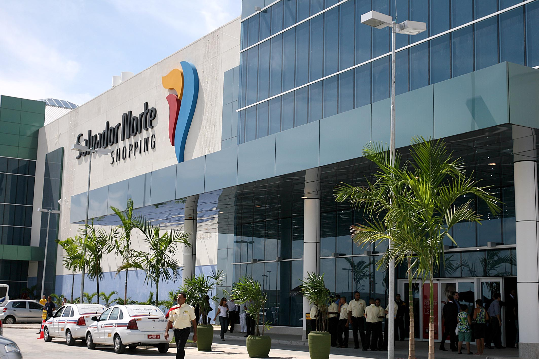 Governador Jaques Wagner participa da inauguração do Salvador Norte Shoping Na foto: Foto: Ronaldo Silva/AGECOM